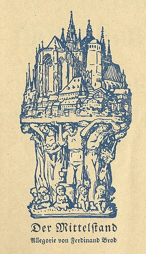 bildhafte Allegorie auf die tragende Rolle des deutschen Mittelstandes